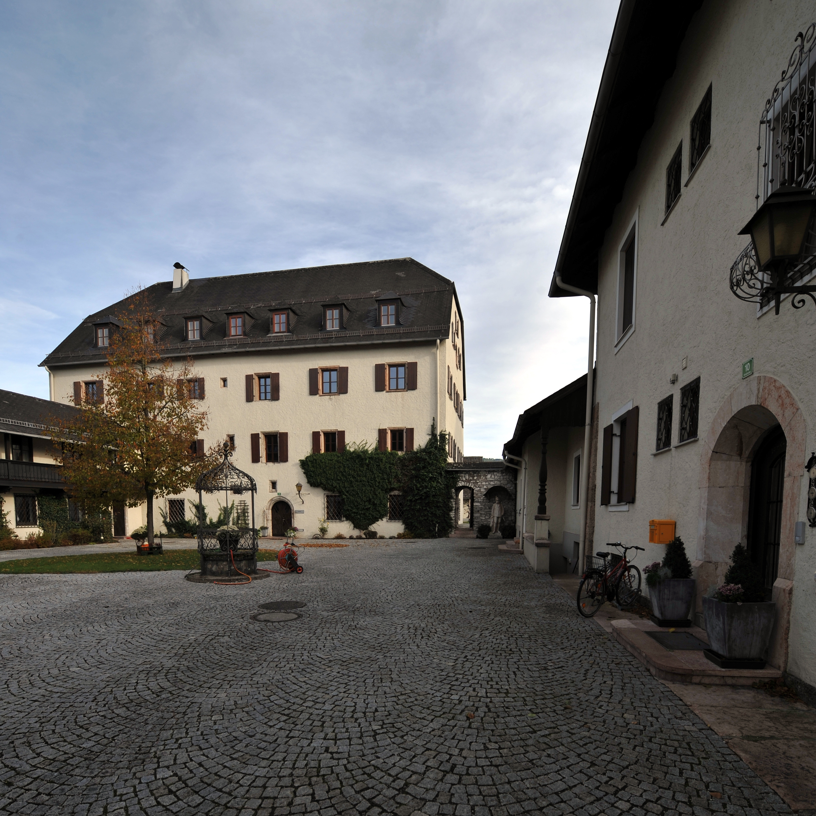 Schloss Winkl, Oberalm, Salzburg